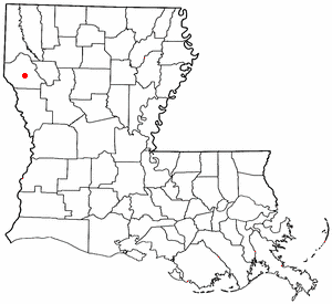 Volapük: Topam in tat: Louisiana.